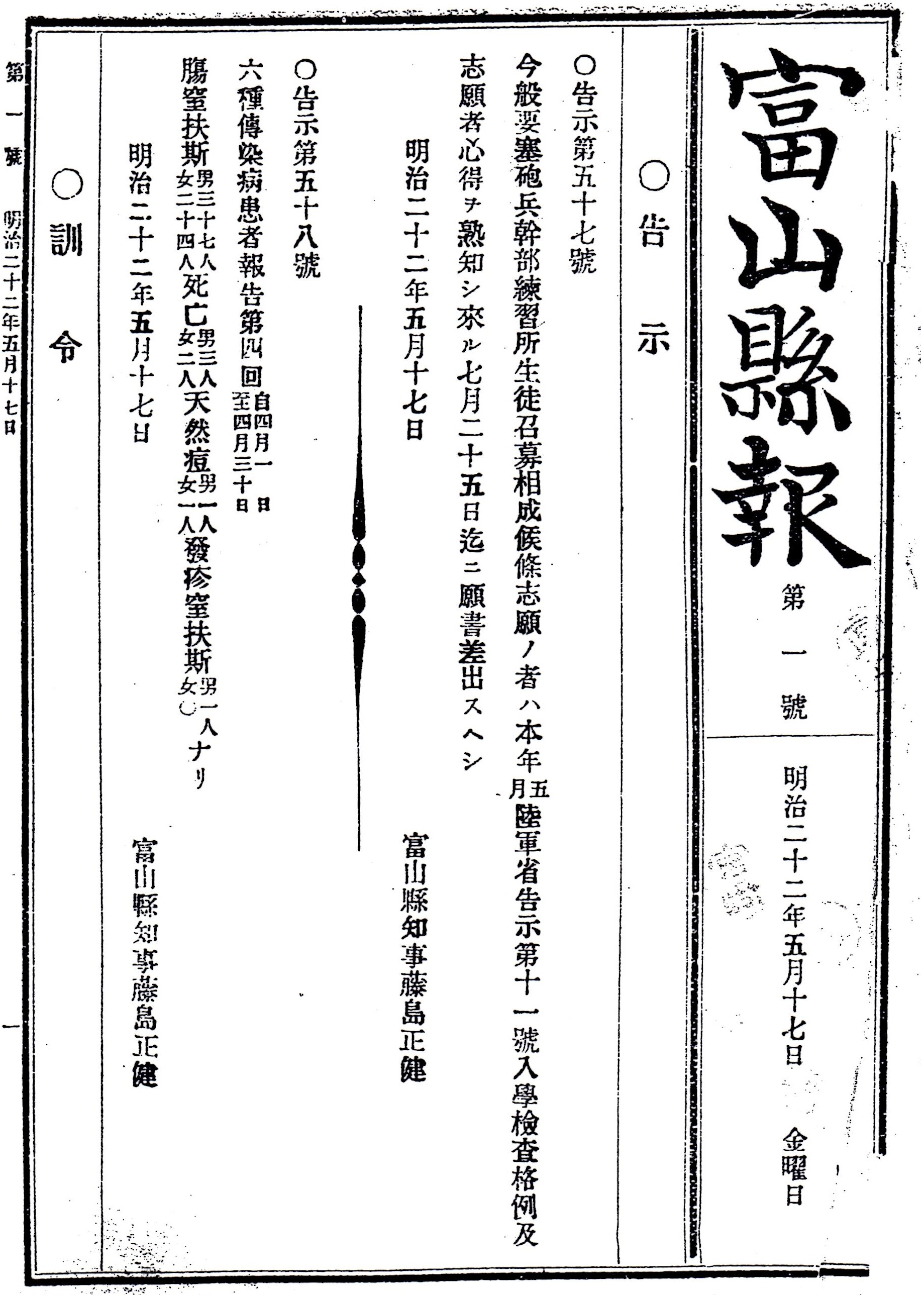 『富山県報』創刊号の1面